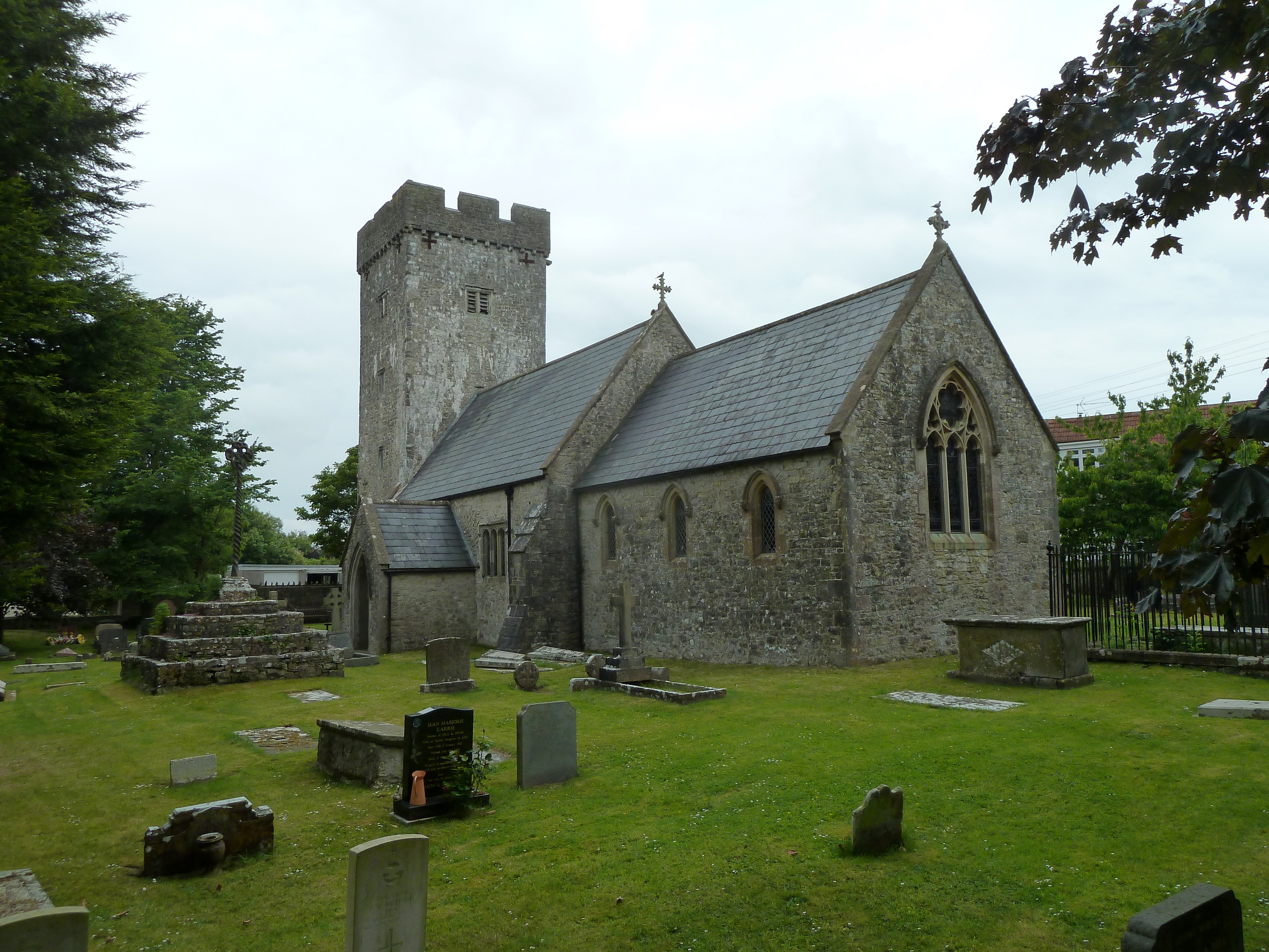 Llanmaes Church